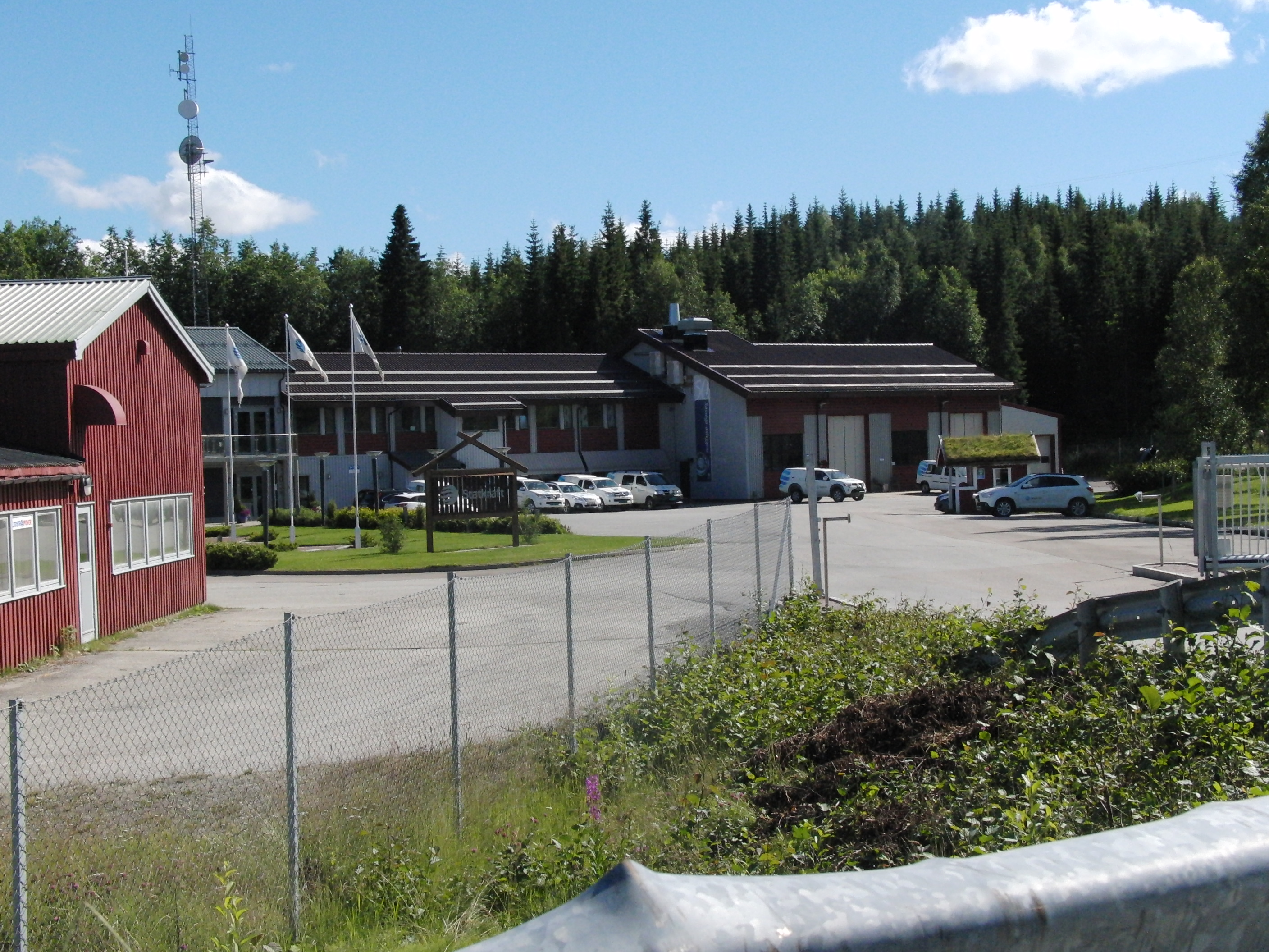 Nedre Røssåga kraftverk